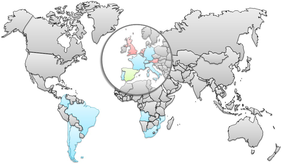 Carte des pays participants au championnat du monde de rink hockey de 2015.